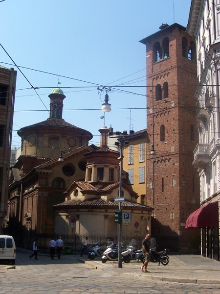 Milano - Chiesa di S. Satiro